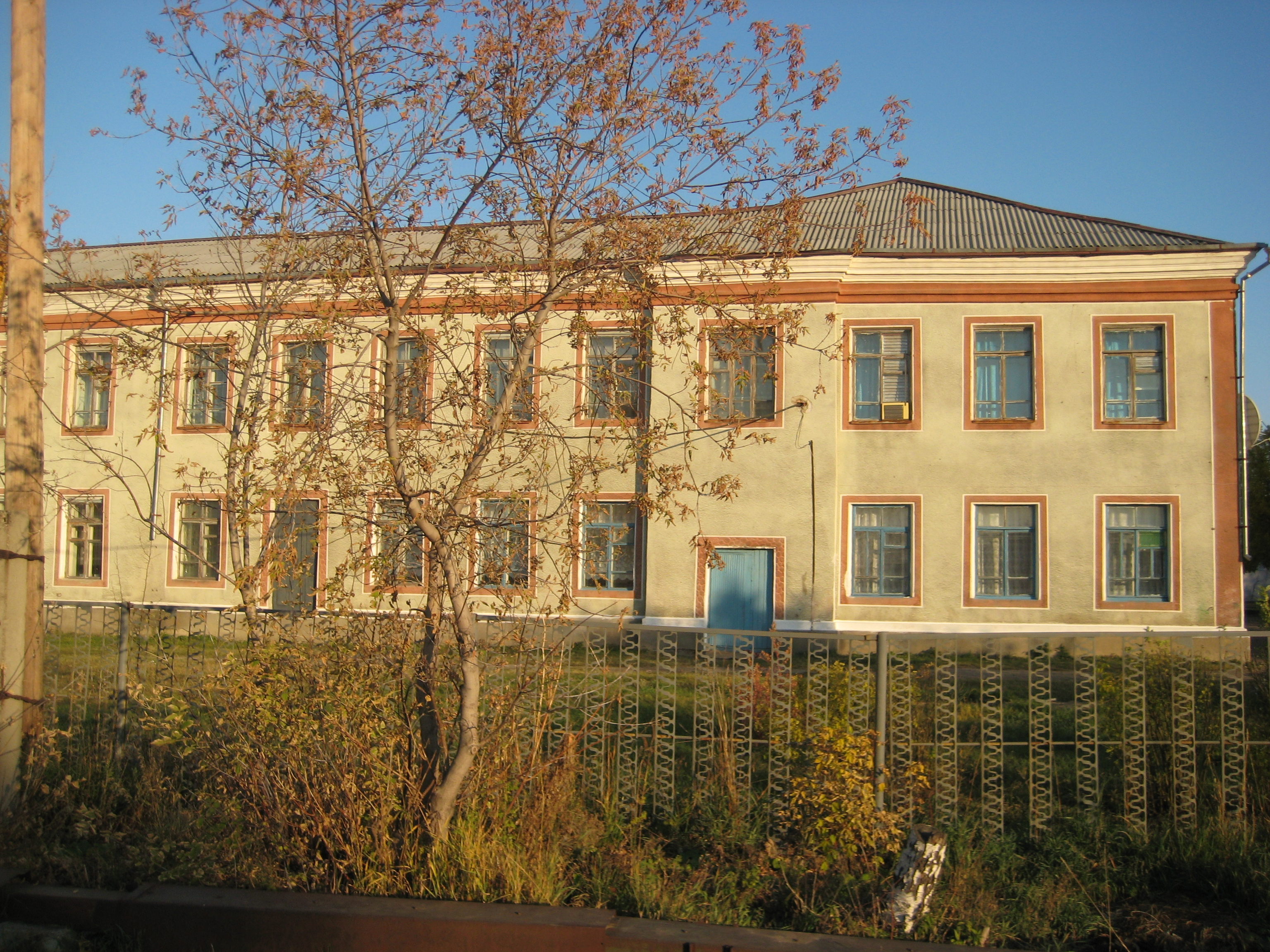 Любинская средняя школа N1, п.г.т. Любино, Омская область, Россия